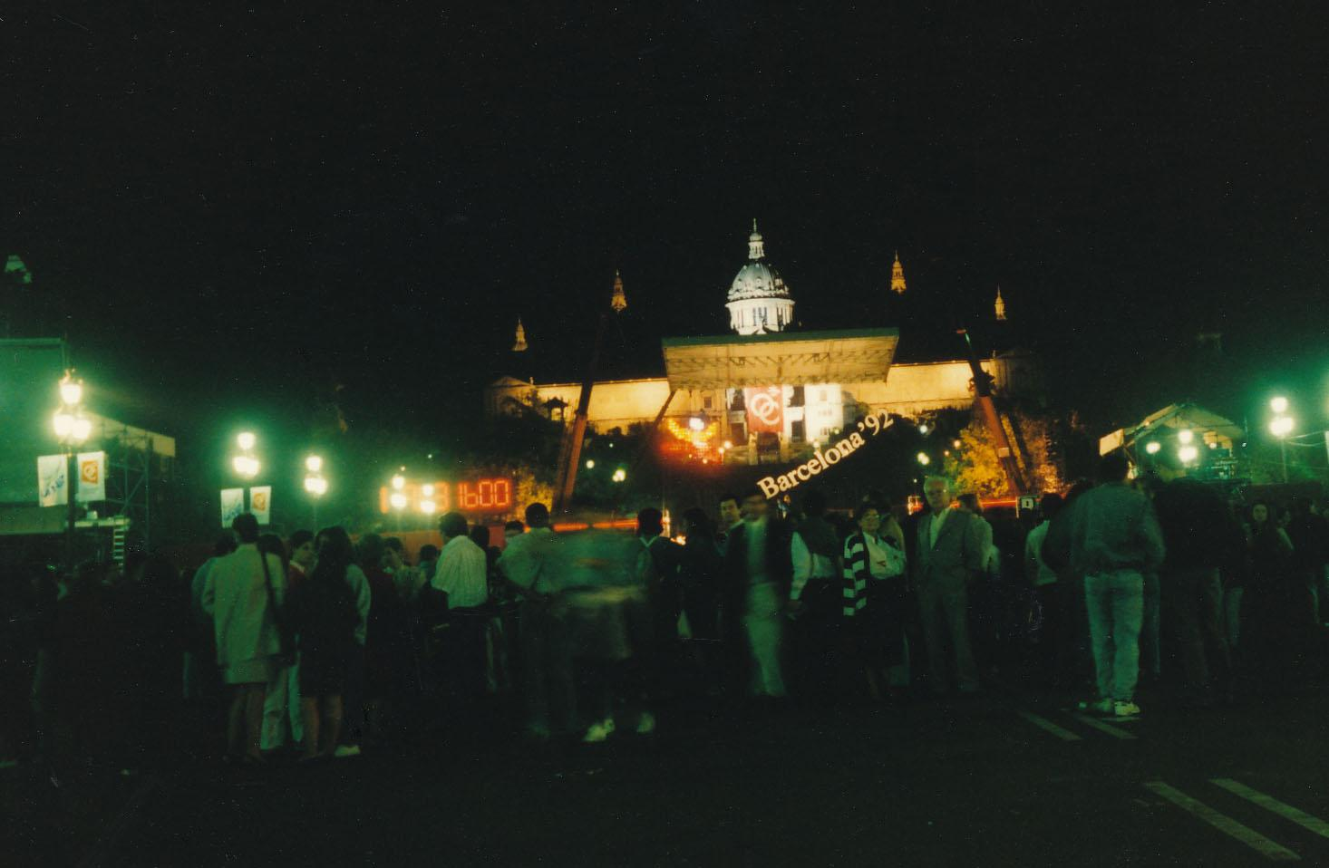 Konzert in Barcelona - anläßlich der Ankunft der "Bandera Olimpica", mit Montserrat Caballé und Freddie Mercury und dem gemeinsamen Olympia-Lied "Barcelona" - sowie mit Rudolf Nurejew als Tänzer Datum: 08.10.1988 Urheber: Michael Pfeiffer Quelle: privates Fotoalbum des Urhebers